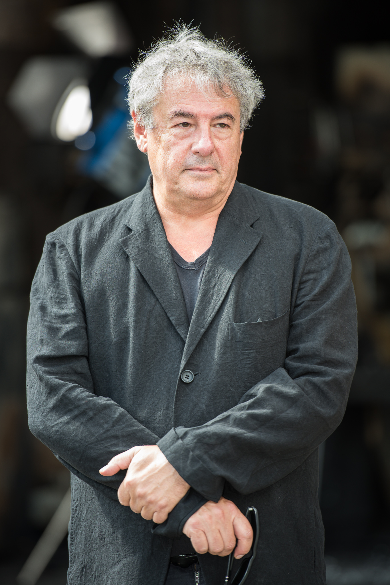 Am Ende geht man nackt,BR,Bayerischer Rundfunk,Franken-Tatort,Markus Imboden,Tatort